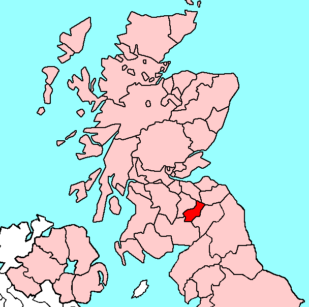 Selkirkshire